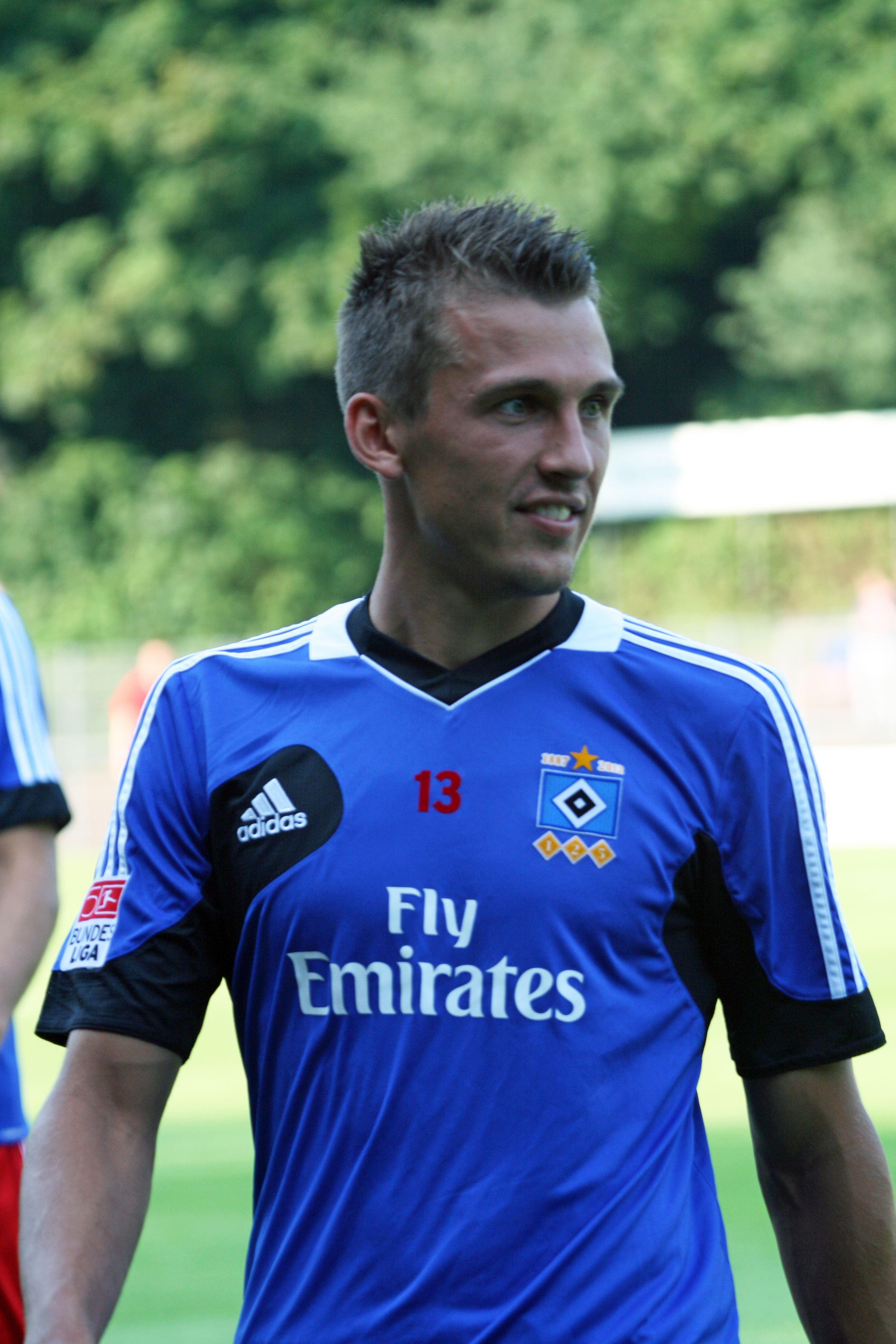 Robert Tesche mit dem Hamburger SV beim Testspiel bei Eintracht Norderstedt / Juli 2012